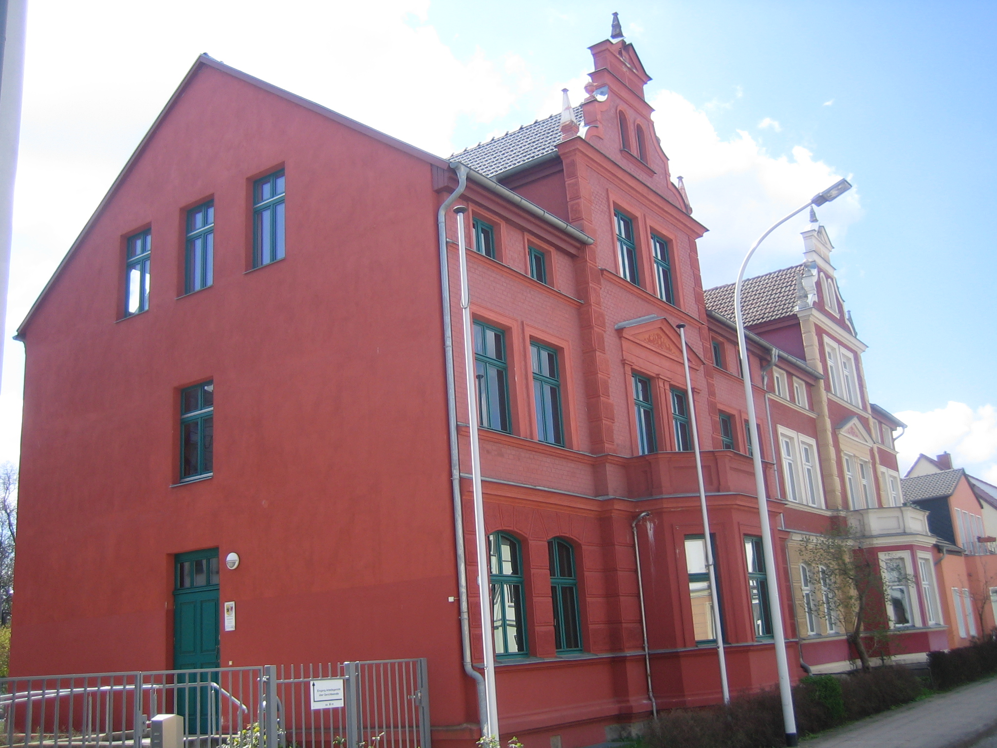 Wohnhaus/Arbeitsgericht Neubrandenburg, Südbahnstraße 8/8a, Neubrandenburg, Mecklenburg-Vorpommern